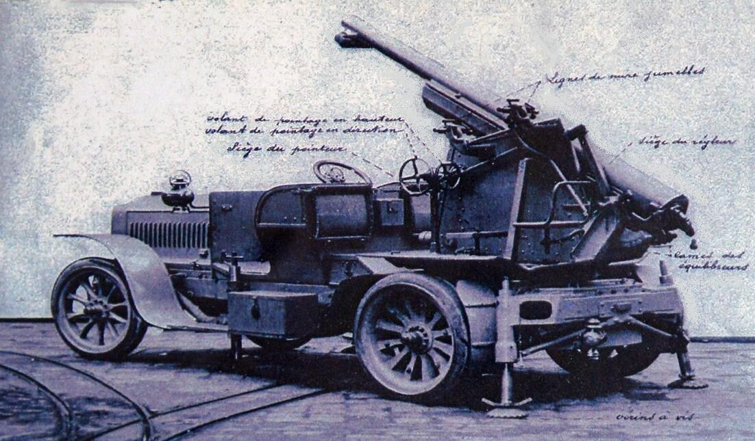 L'auto-canon de 75 modèle 1913. Texte à gauche de haut en bas : volant de pointage en hauteur, volant de pointage en direction, siège du pointeur. Sur la droite de haut en bas : lignes de mire jumelles, siège du règleur, lames des équilibreurs, vérins à vis. Monté sur le chassis renforcé d'une de Dion Bouton.